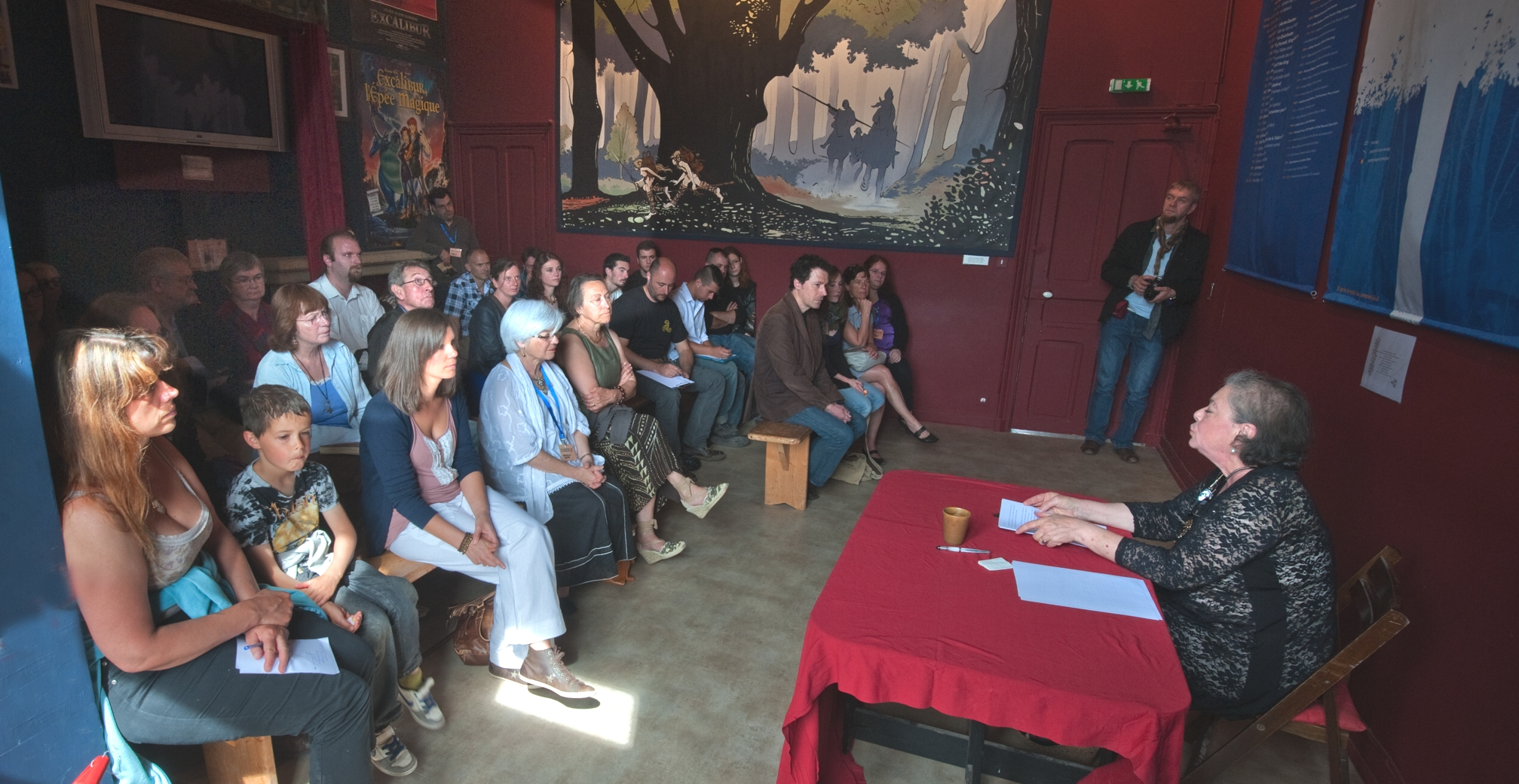 Conférence de Claudine Glot lors des 8èmes Rencontres de l'Imaginaire (2012).